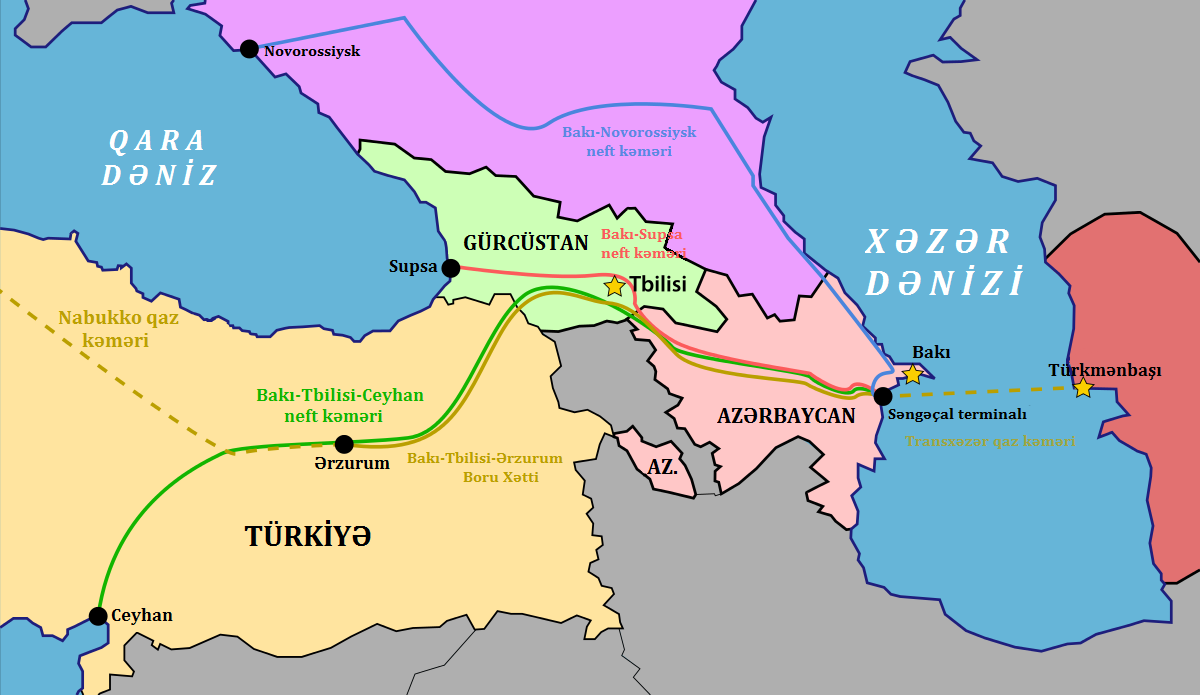 Bakıdan mövcud və planlaşdırılan neft və qaz kəmərlərinin xəritəsi.